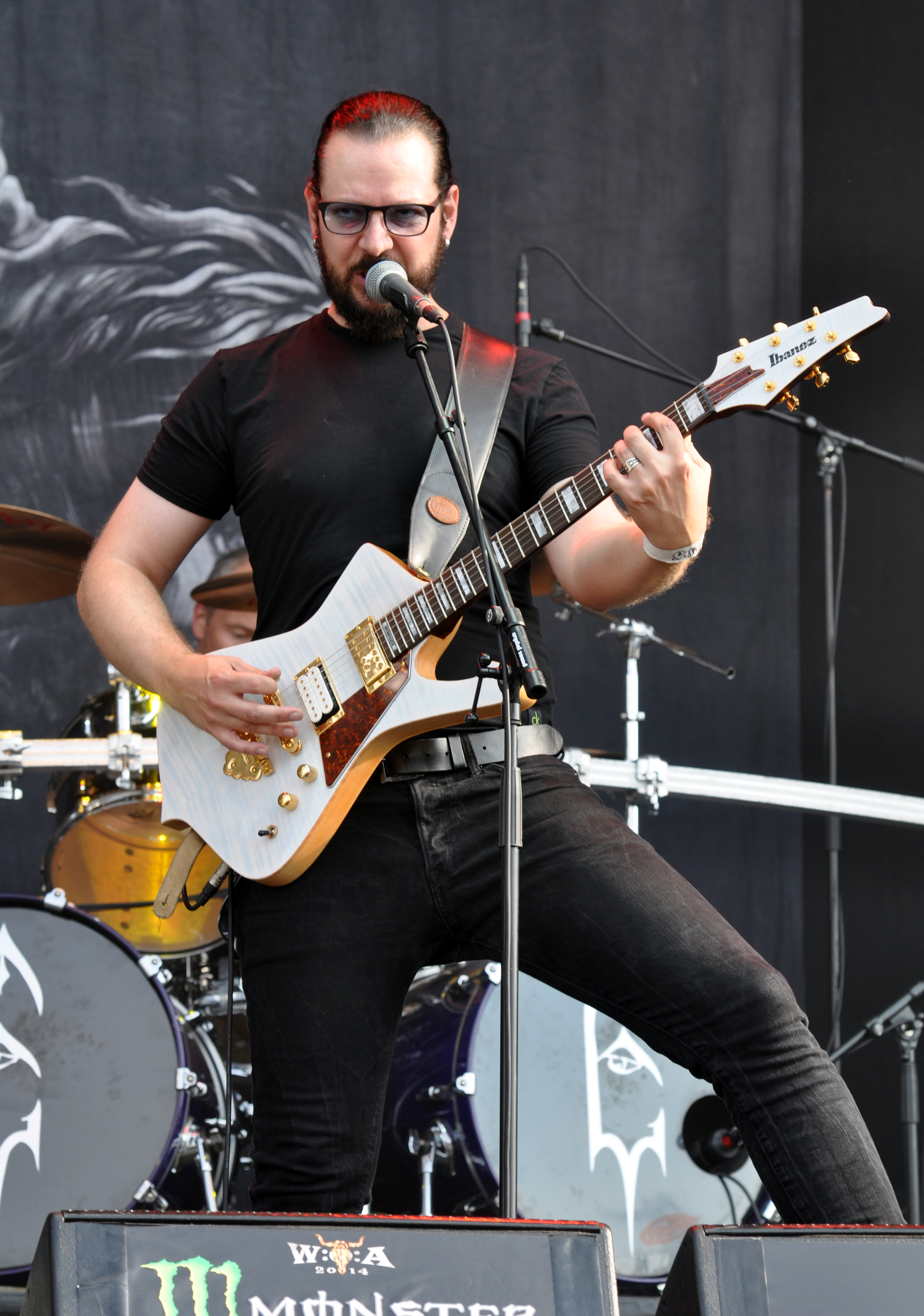 02-08-2014-Vegard „Ihsahn“ Tveitan with Emperor at Wacken Open Air 2014-JonasR